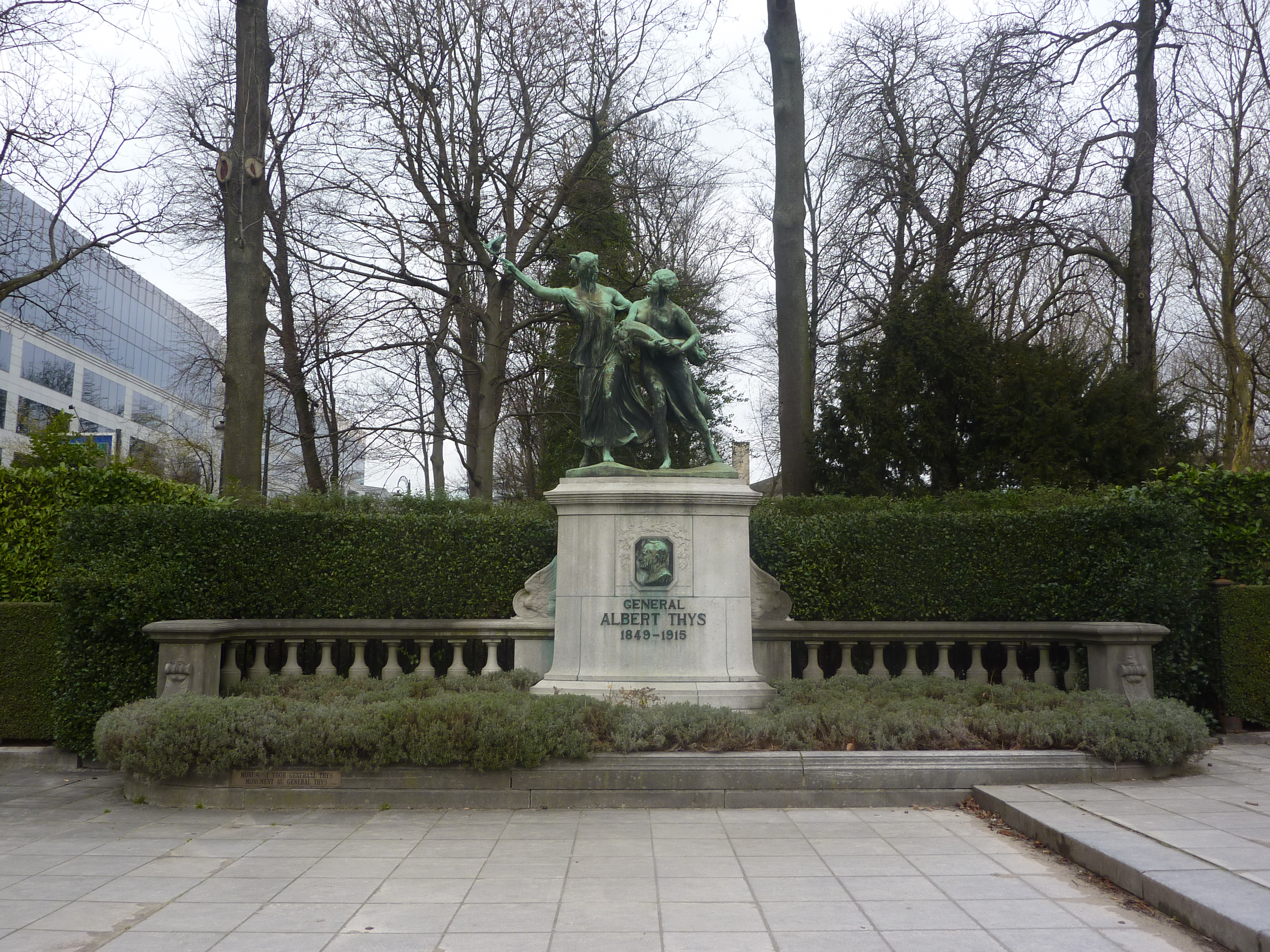 Monument Général Albert Thys au parc du Cinquantenaire à Bruxelles, Belgique.